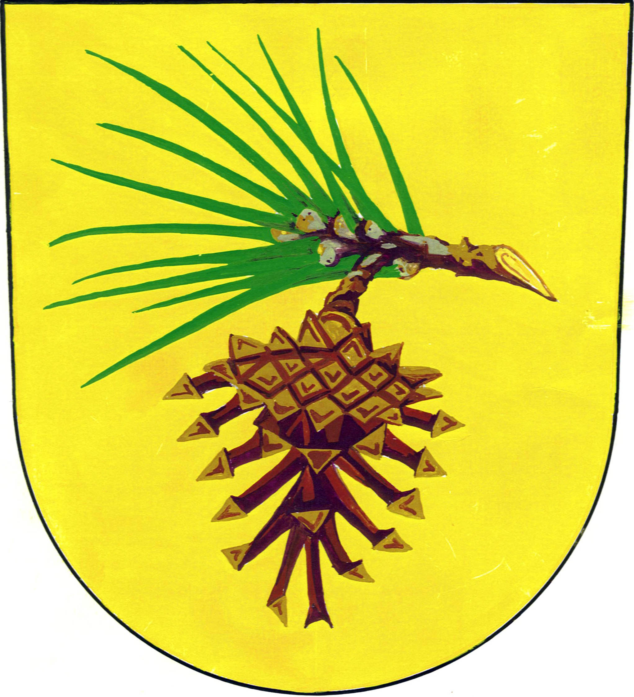 Znak obce Bor u Skutče